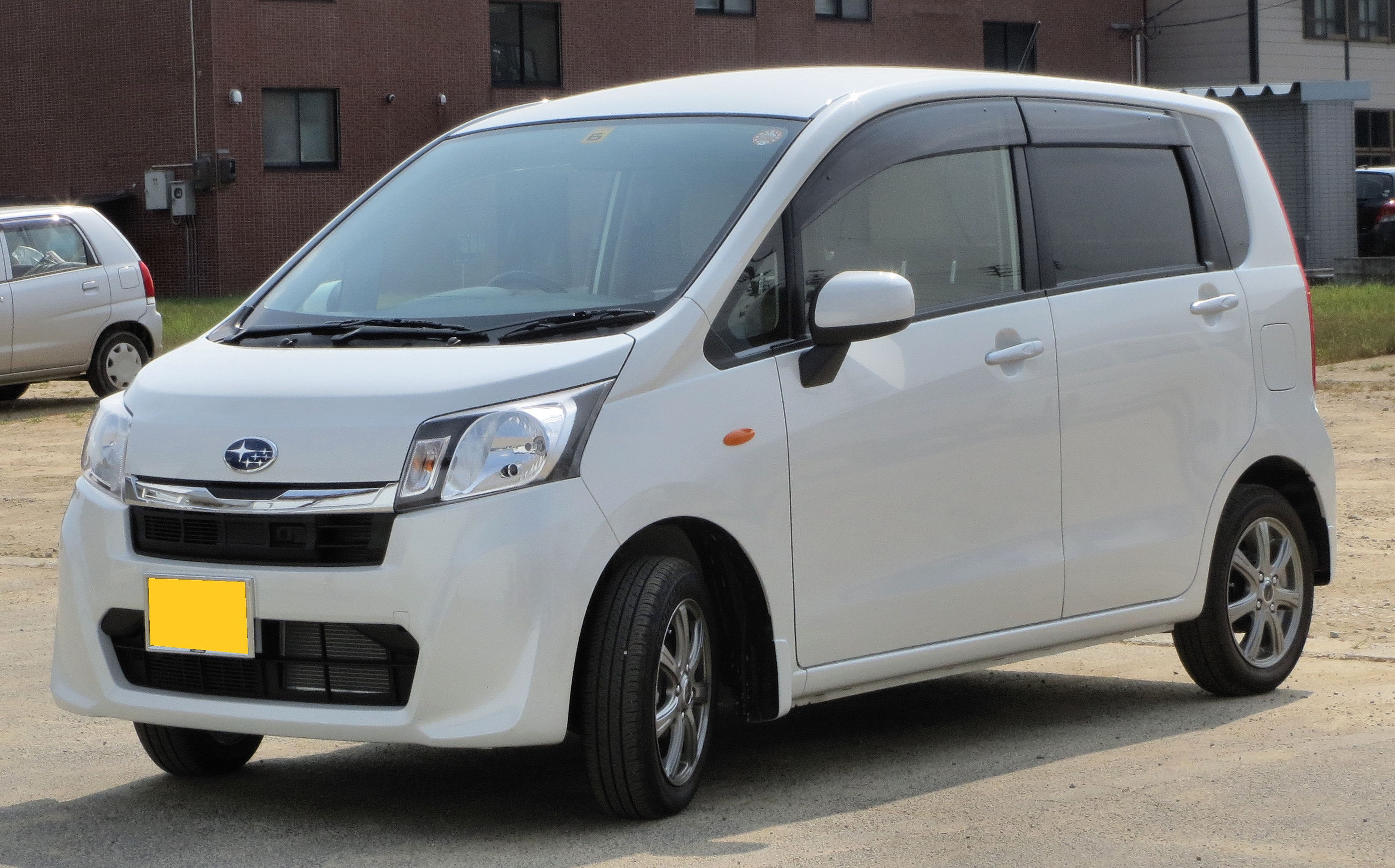 スバル ステラ L スマートアシストAWD